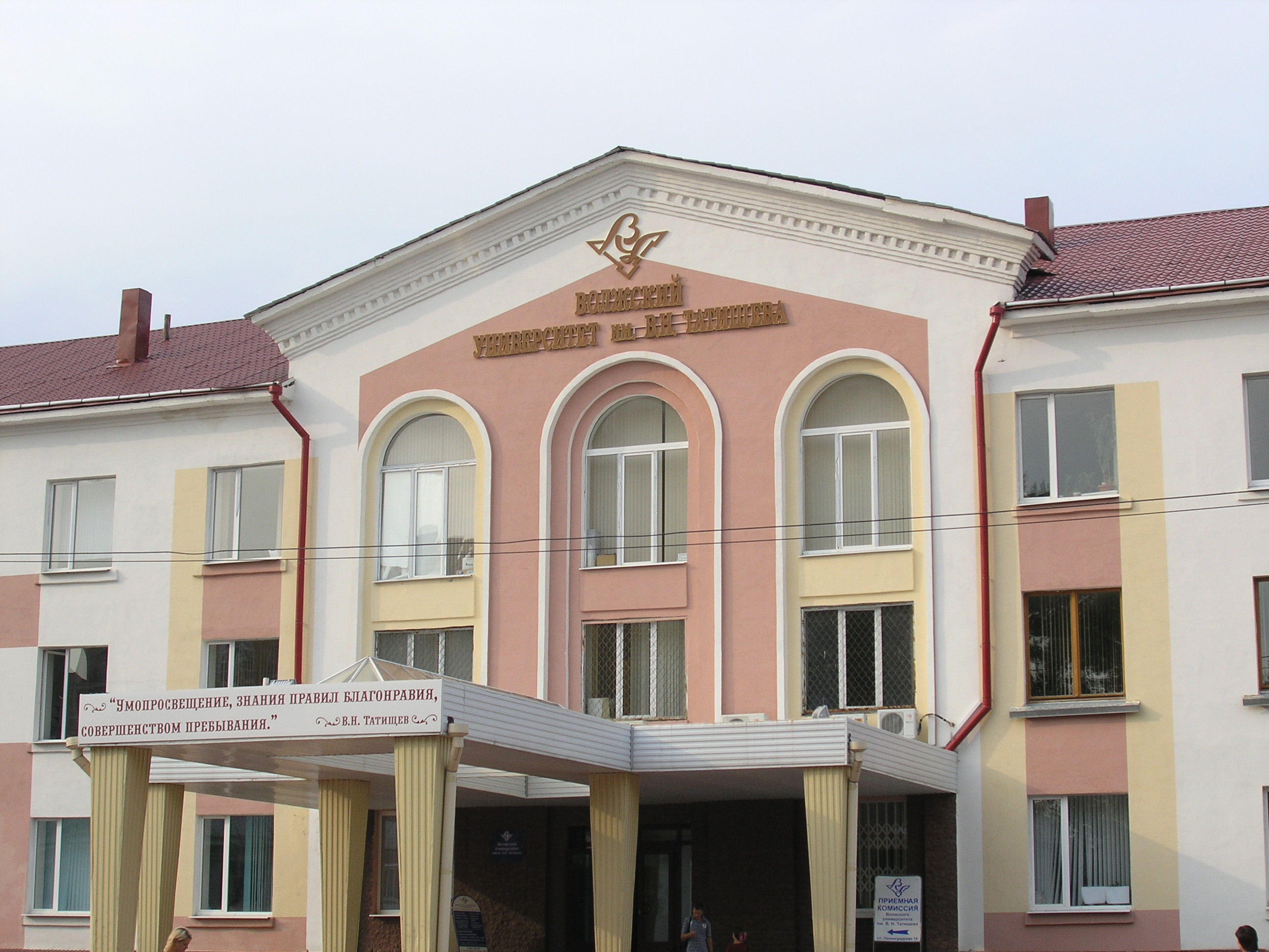 Здание Волжского университета им. В. Н. Татищева, Тольятти, Россия